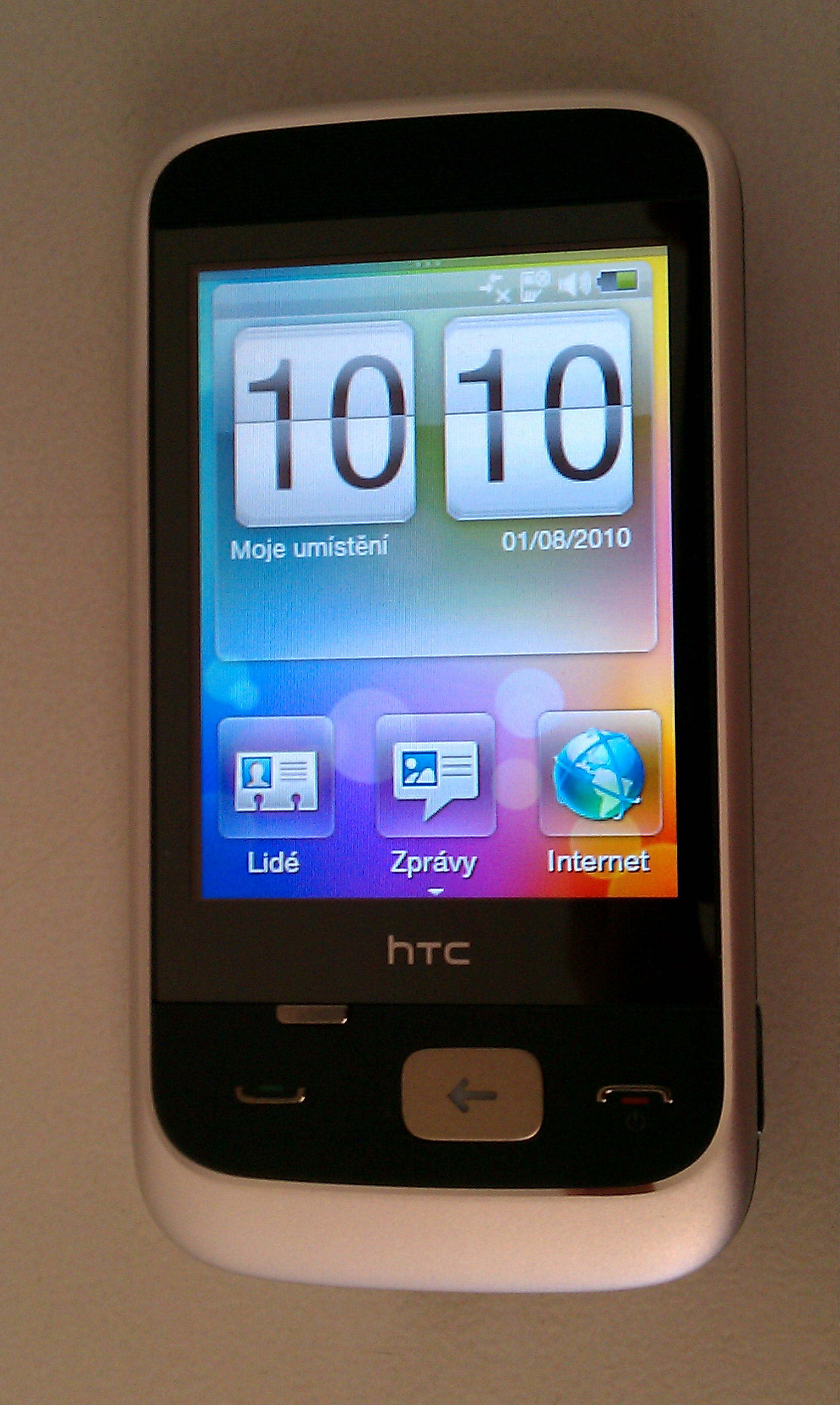 HTC Smart